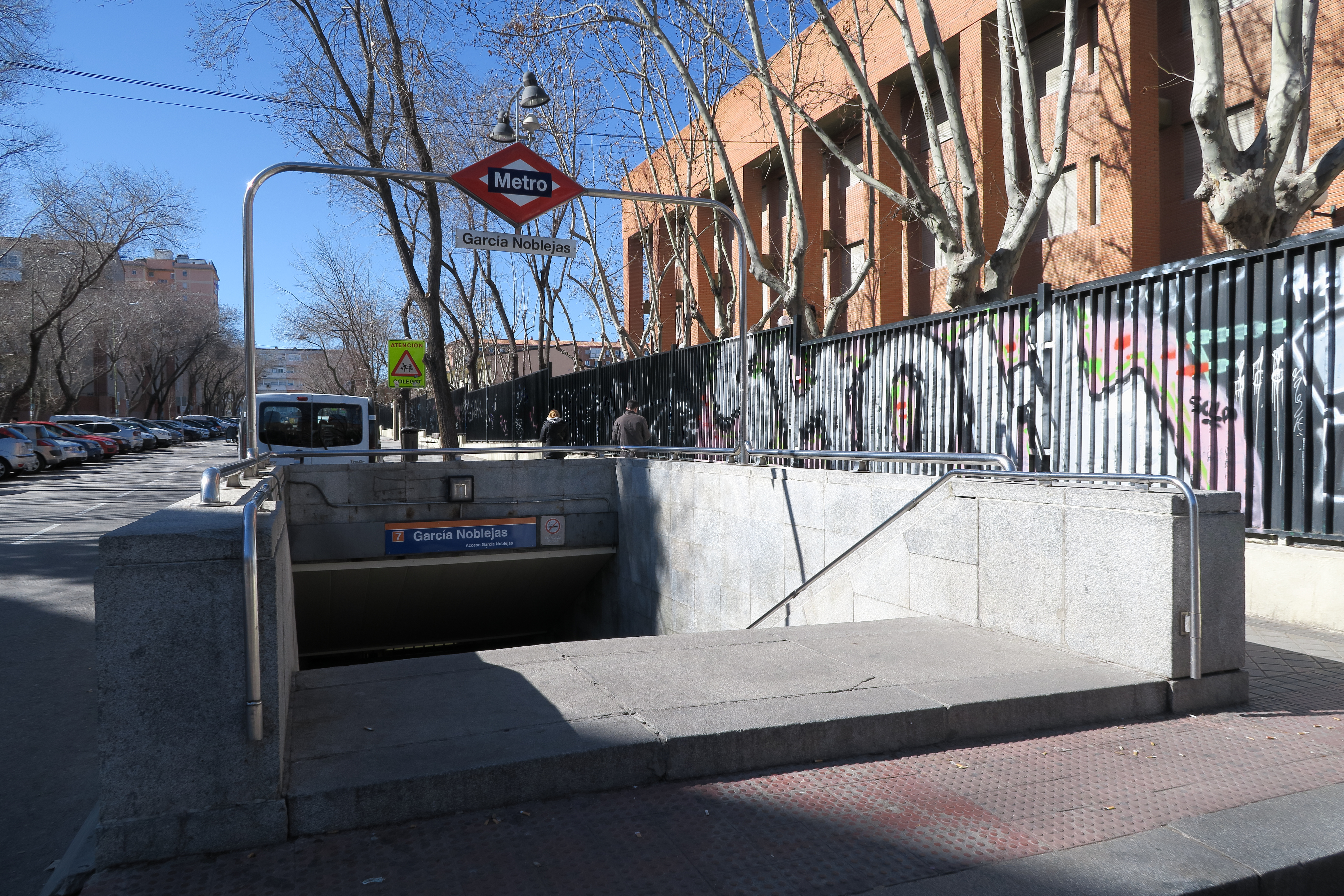 Estación de García Noblejas